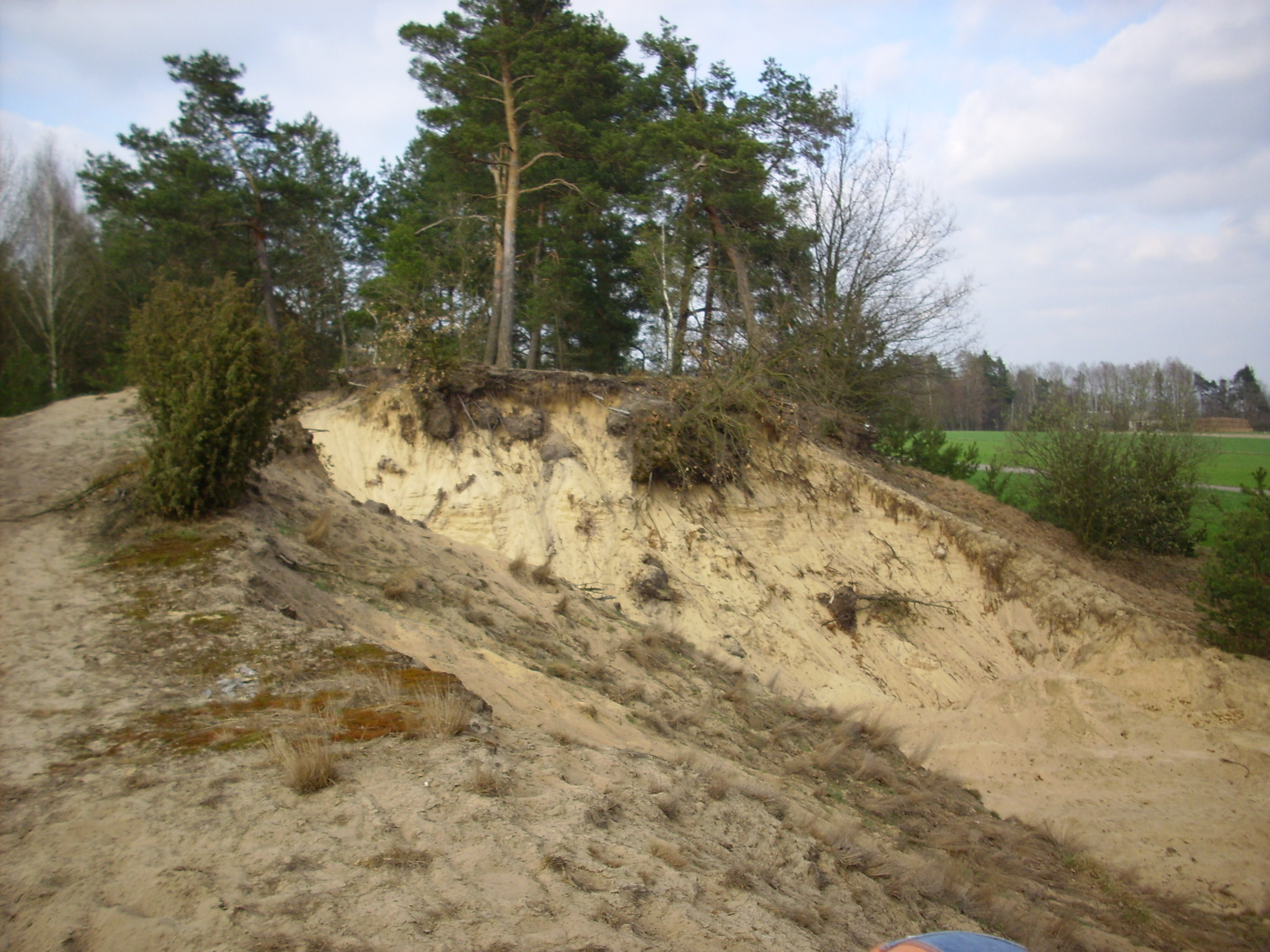 Piaskowe pagórki w okolicach miejscowości Wielgolas i Stary Patok w gminie Krzywda, pow. łukowski, woj. lubelskie, Polska.